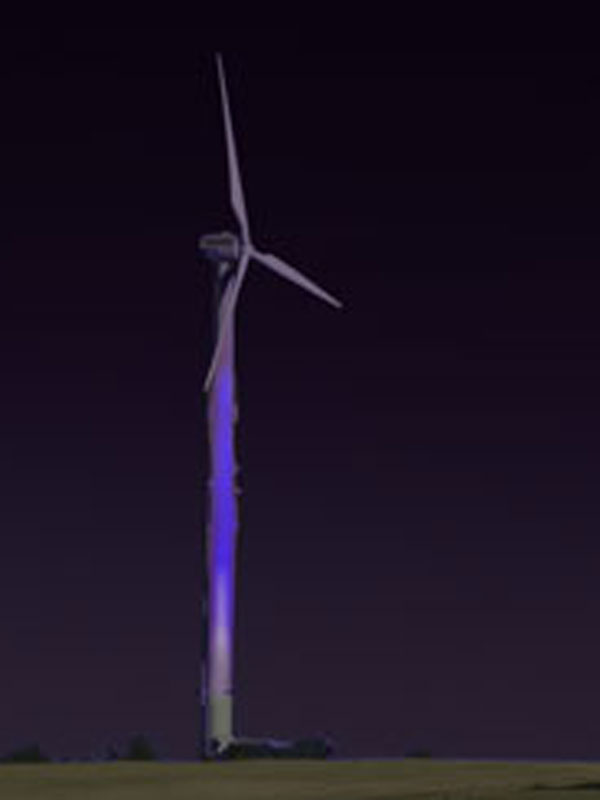 Bergkamen Lichtkunstwerk "Das blaue Licht" von Horst Rellecke